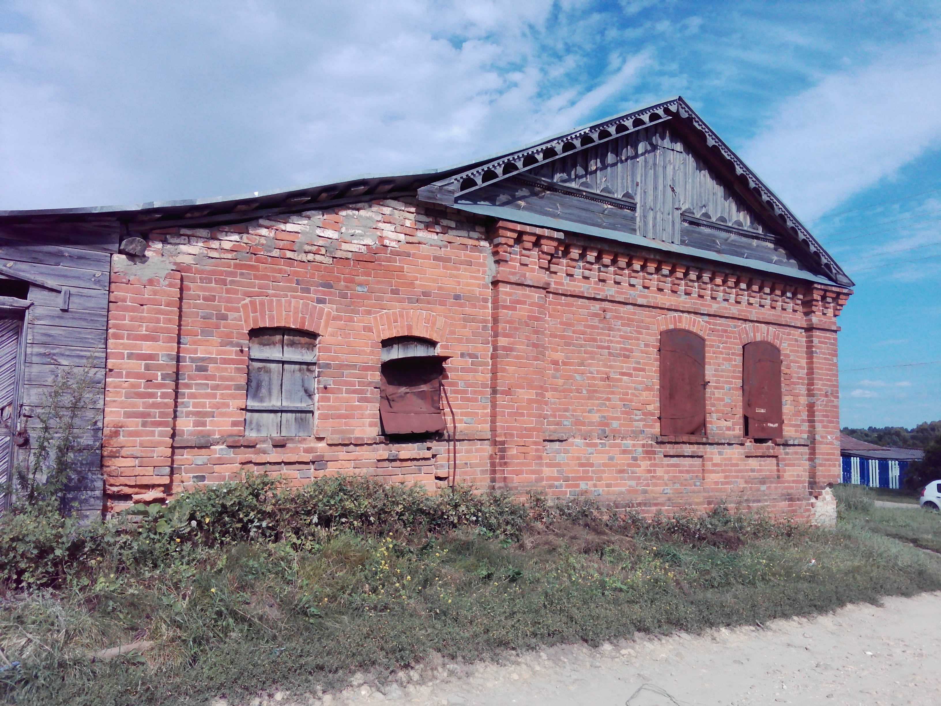 ул. 1 мая, д. 54А